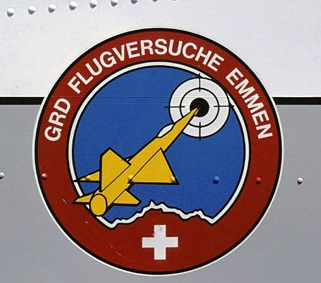 Grd badge